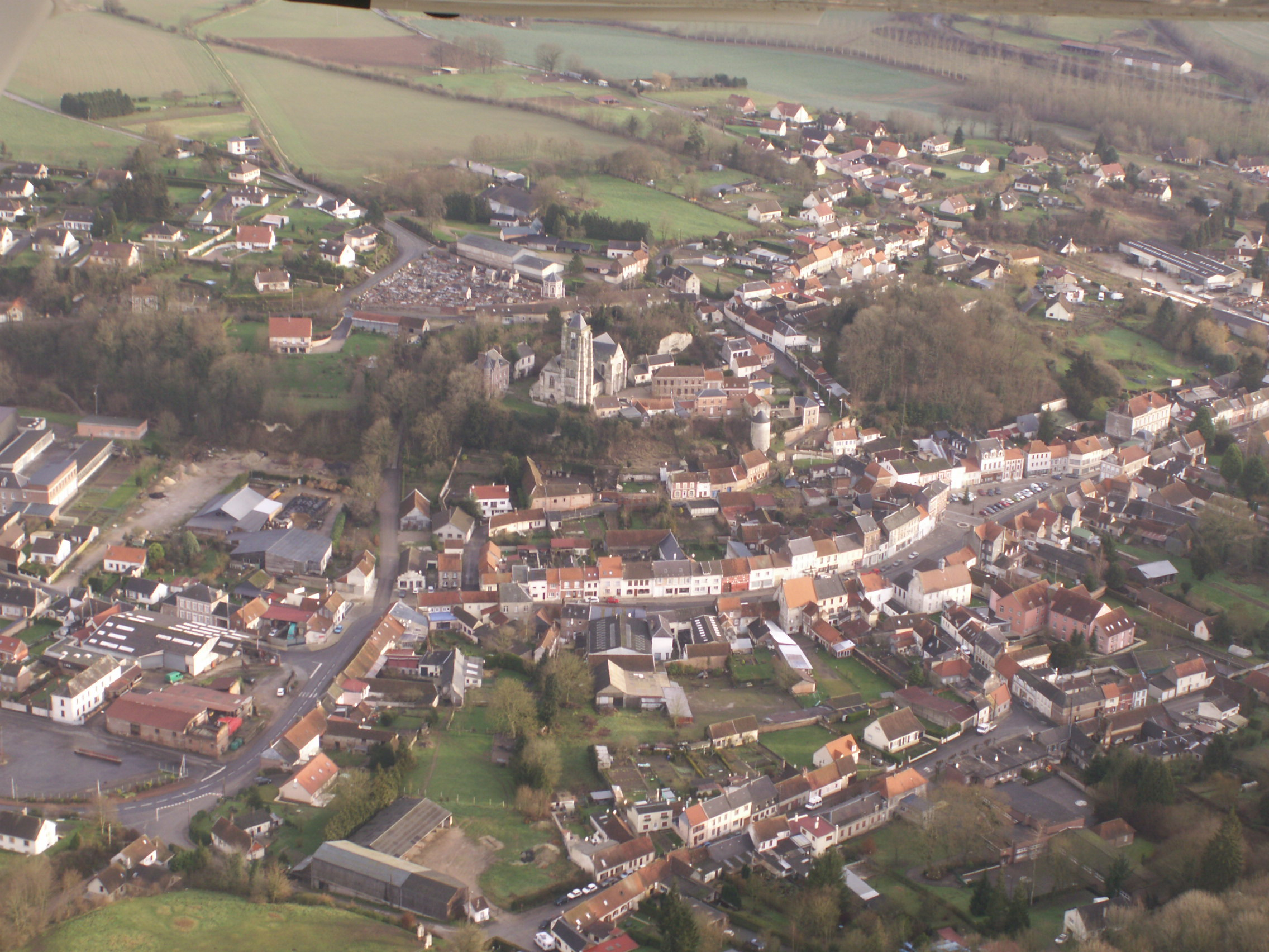 Vue aérienne de Domart en Ponthieu Janvier 2007